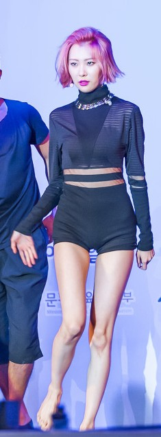 2013년 9월 29일 그린 리본 마라톤 대회 희망콘서트에서 선미.